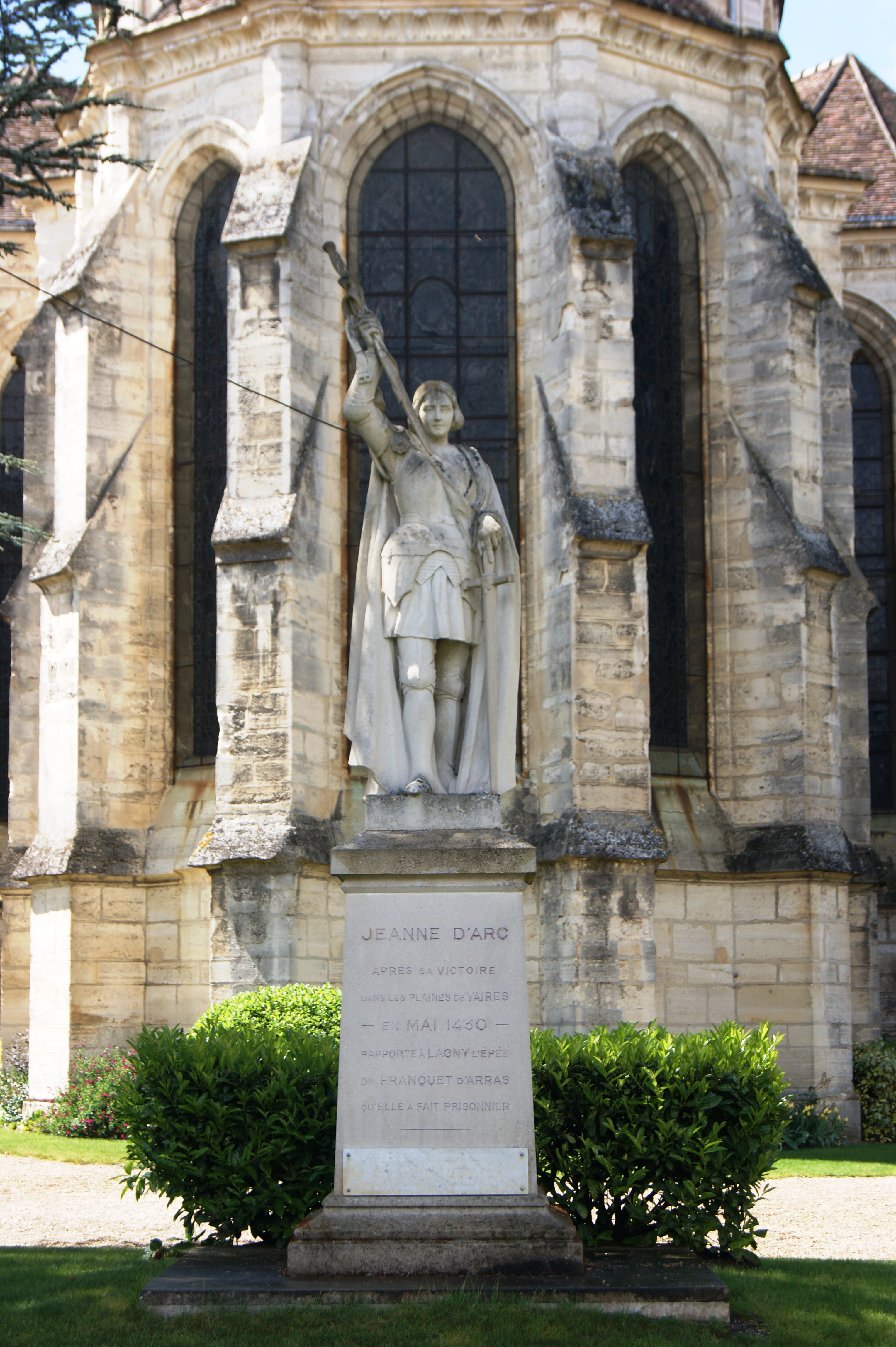 Statue Jeanne d'Arc, Square Jeanne d'Arc, Lagny-sur-Marne. Inscription sur le socle: Jeanne d'Arc après sa vitoire dans les plaines de Vaires - en mai 1430 - rapporte à Lagny l'épée de Franquet d'Arras qu'elle a fait prisonnier.